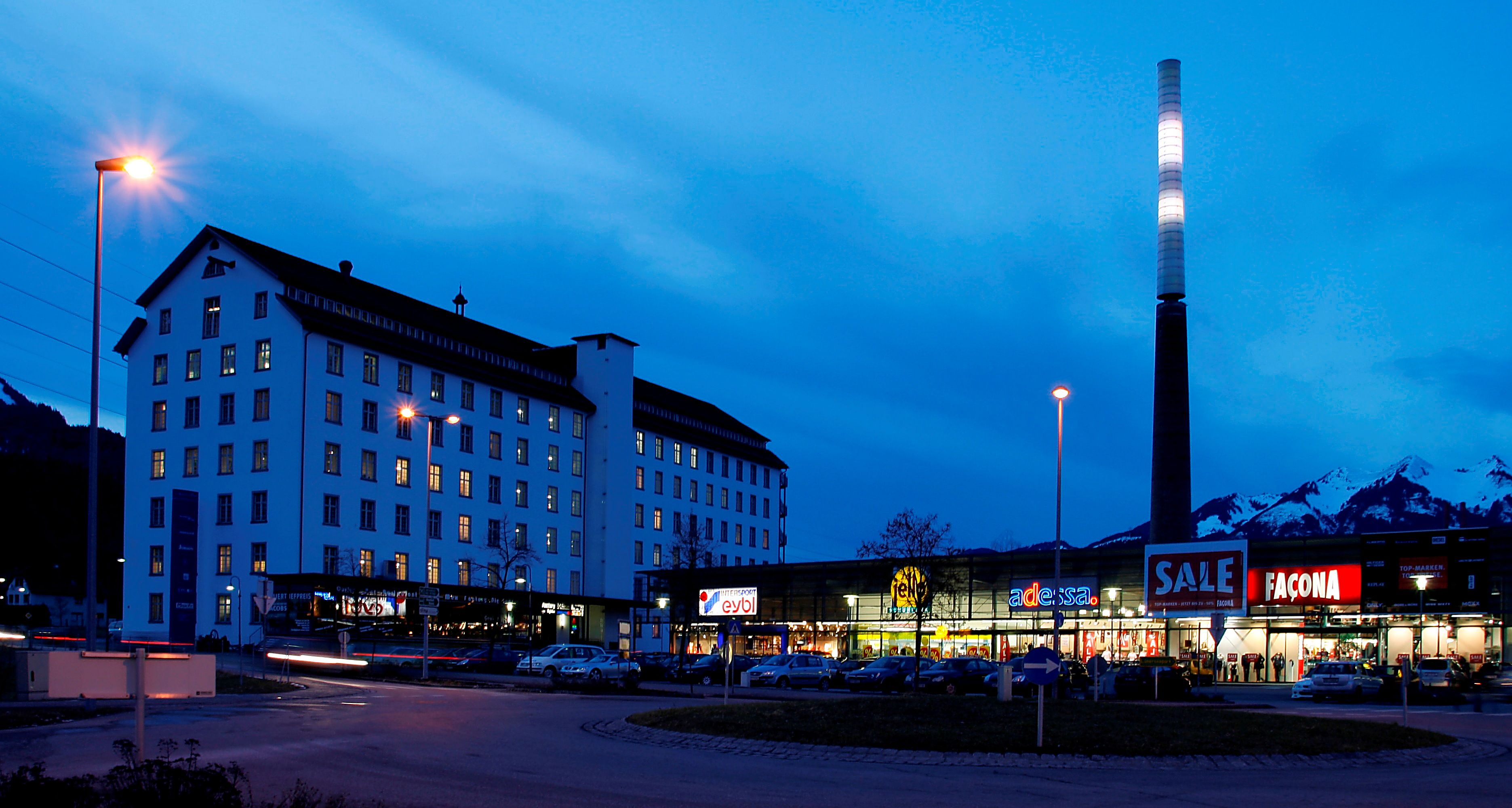 aus dem DEHIO Vorarlberg 1983: Spinnerei und Weberei Lünersee der Textilwerke Getzner, Mutter & Cie, in der Bürser Allee. 1836 erbaut. Erweiterungen 1850, 1856/57. 20achsig, 6geschossig mit ausgebautem Dachgeschoss unter Sattel- und Pultdach. Bemerkenswerter, früher Industriehochbau. *** in Bürs bei Bludenz. Heute EKZ Einkaufszentrum Lünerseepark.